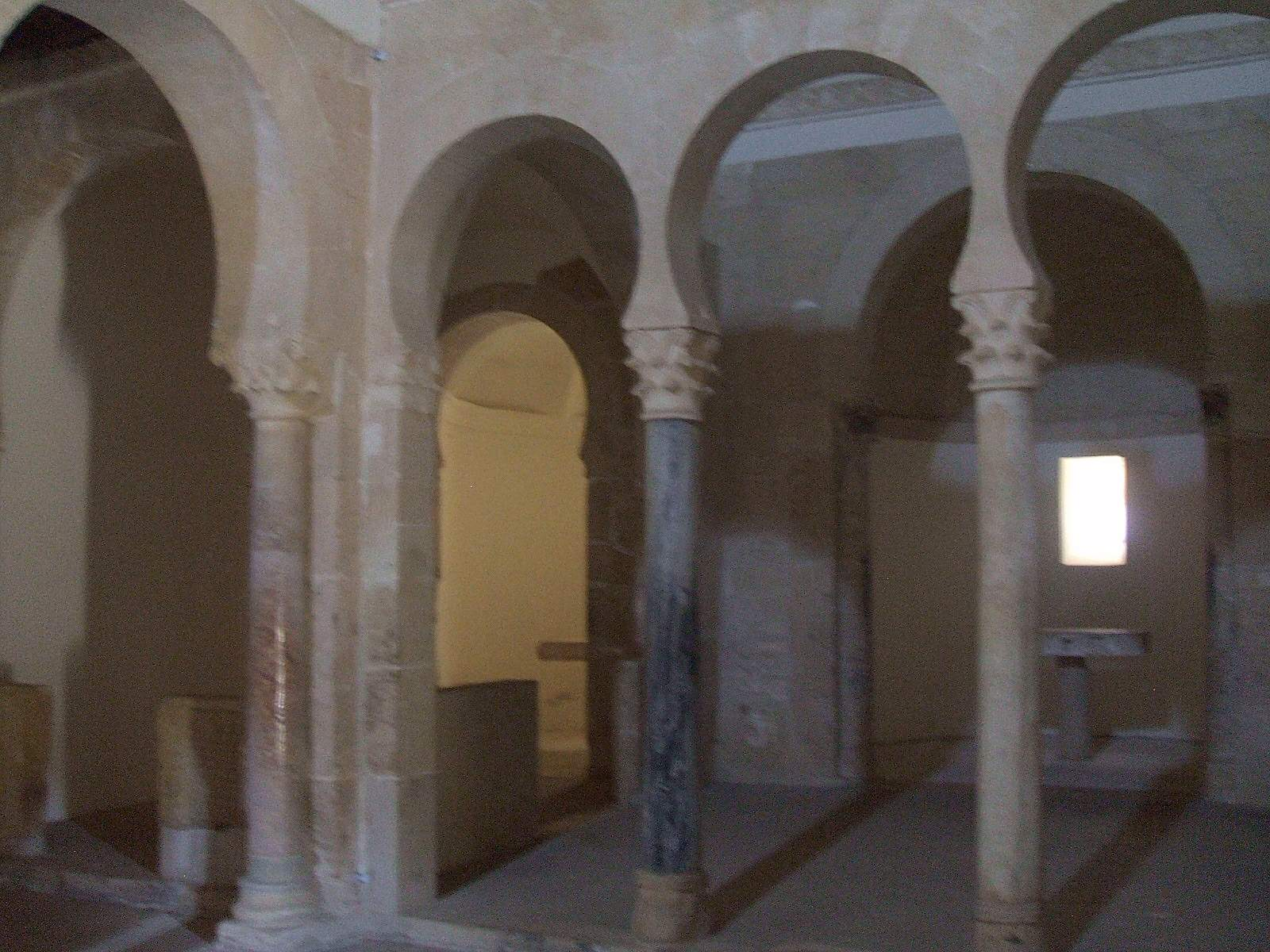 Monasterio de San Miguel de Escalada